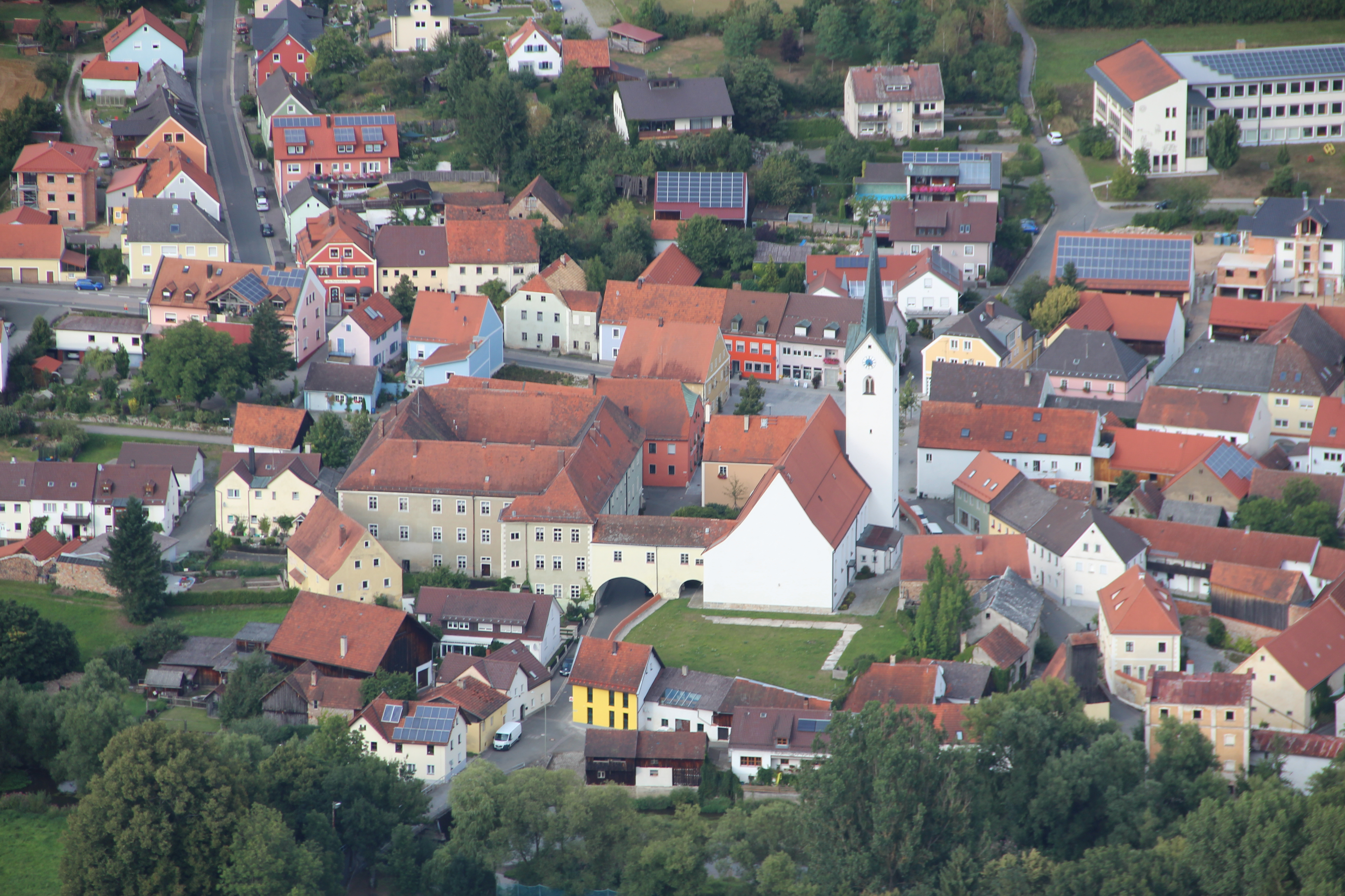 Ehemaliges Kloster in Schwarzhofen, Landkreis Schwandorf, Oberpfalz, Bayern (2012)